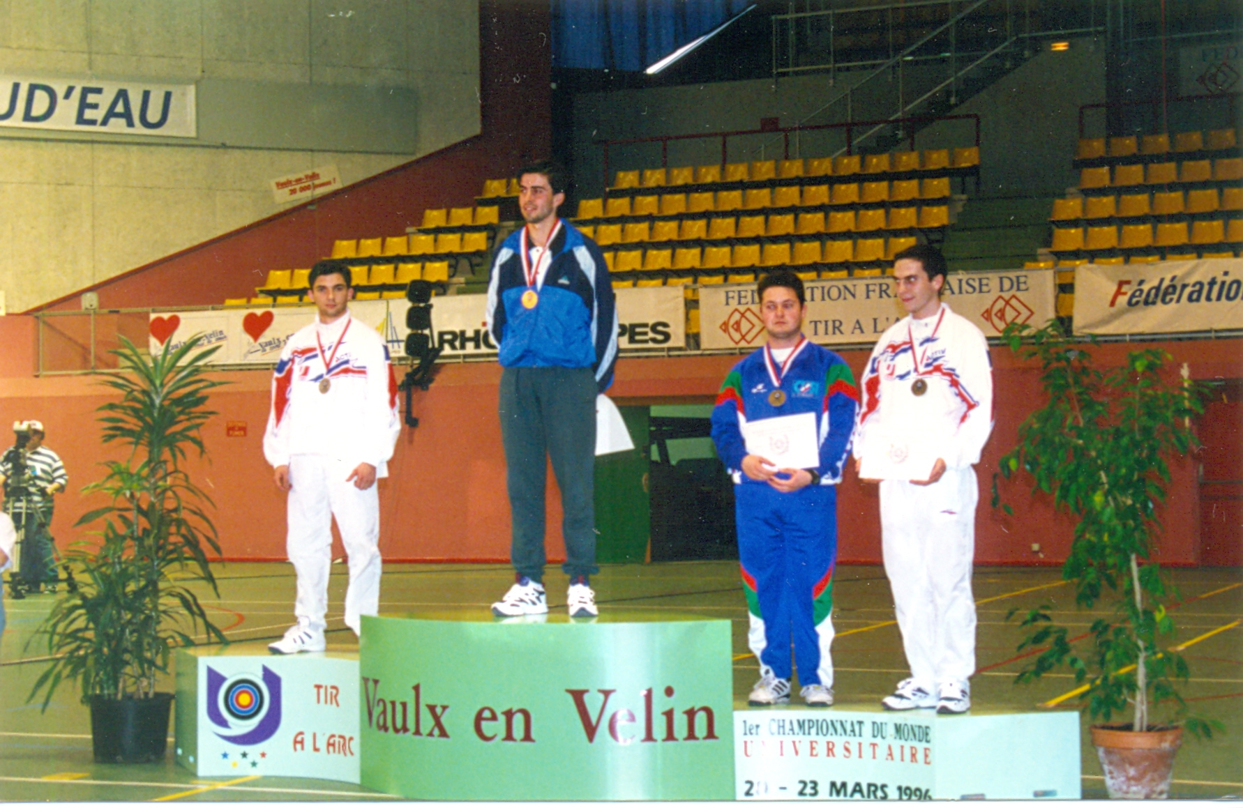 ירון טל קולסניק (במרכז) בעת זכייתו במדליית זהב באליפות העולם לסטודנטים 1996